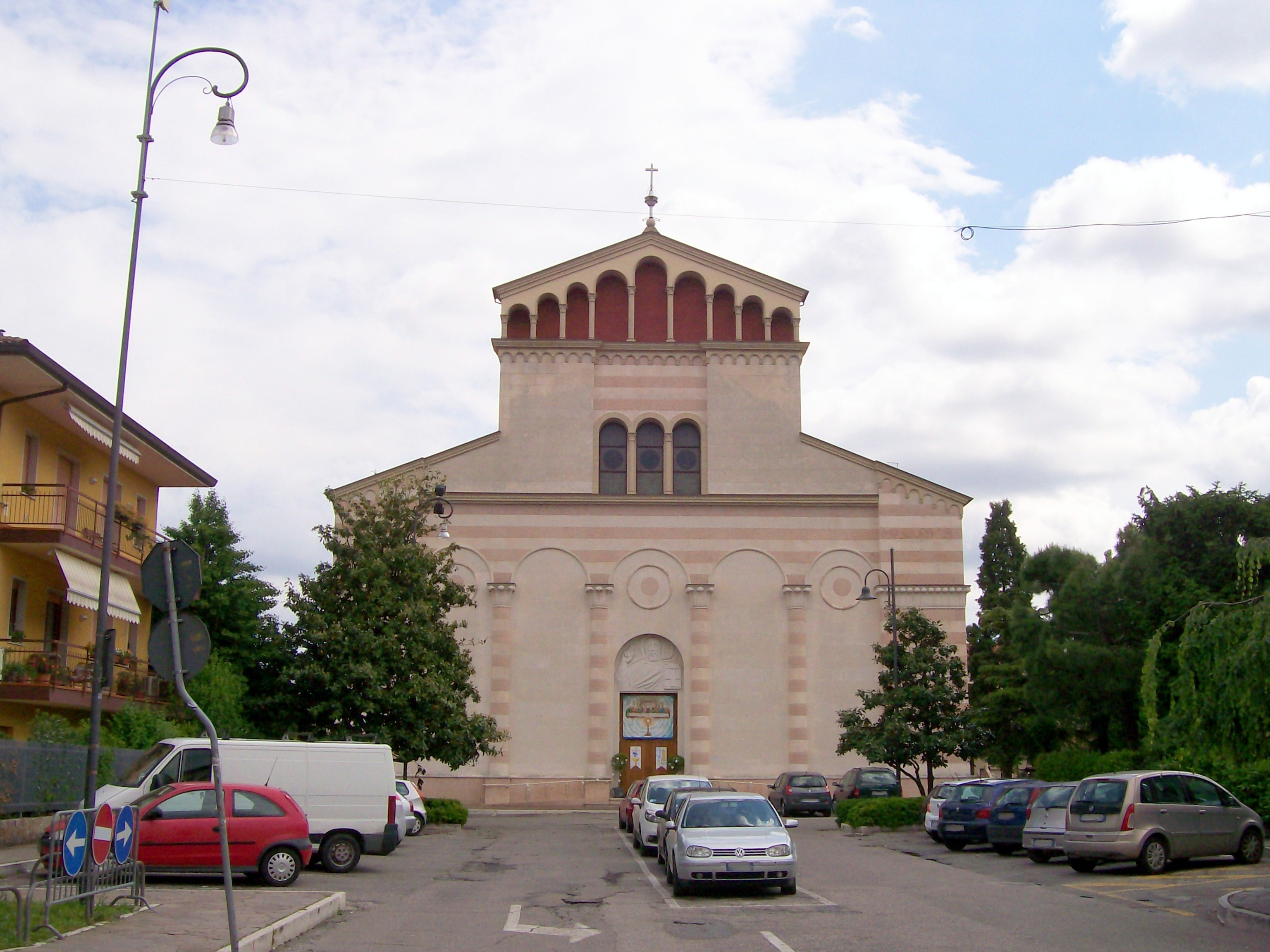 Sagrato e facciata della chiesa parrocchiale di Sant'Anna in Lugagnano di Sona (VR).